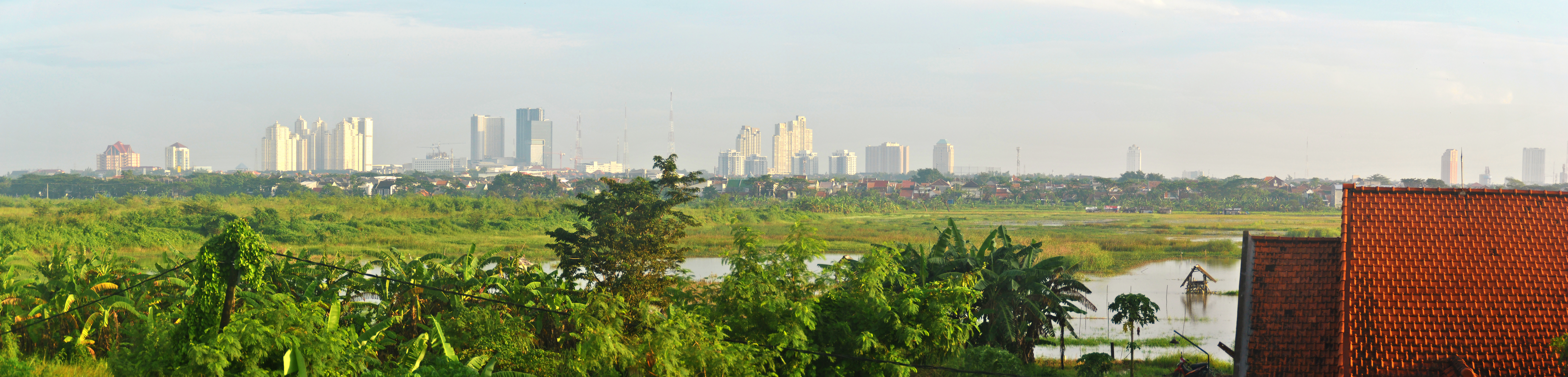 Surabaya Barat